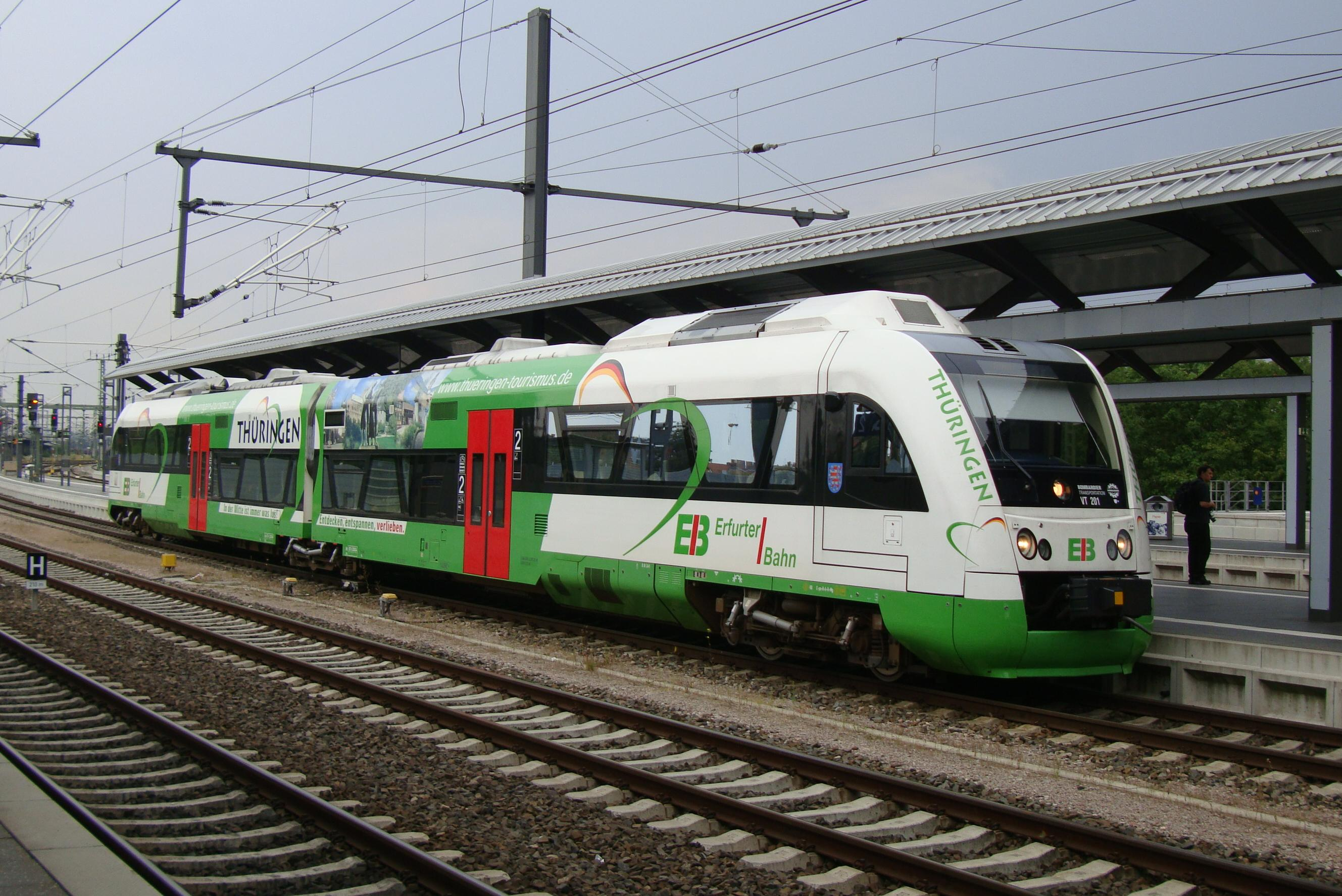 Bombardier Itino (VT 201) der Erfurter Bahn in Erfurt Hbf kurz vor der Abfahrt nach Ilmenau